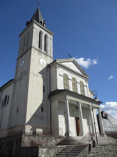 Extérieur de l'église